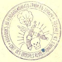 Печат на войводата на ВТРО Тане Николов.